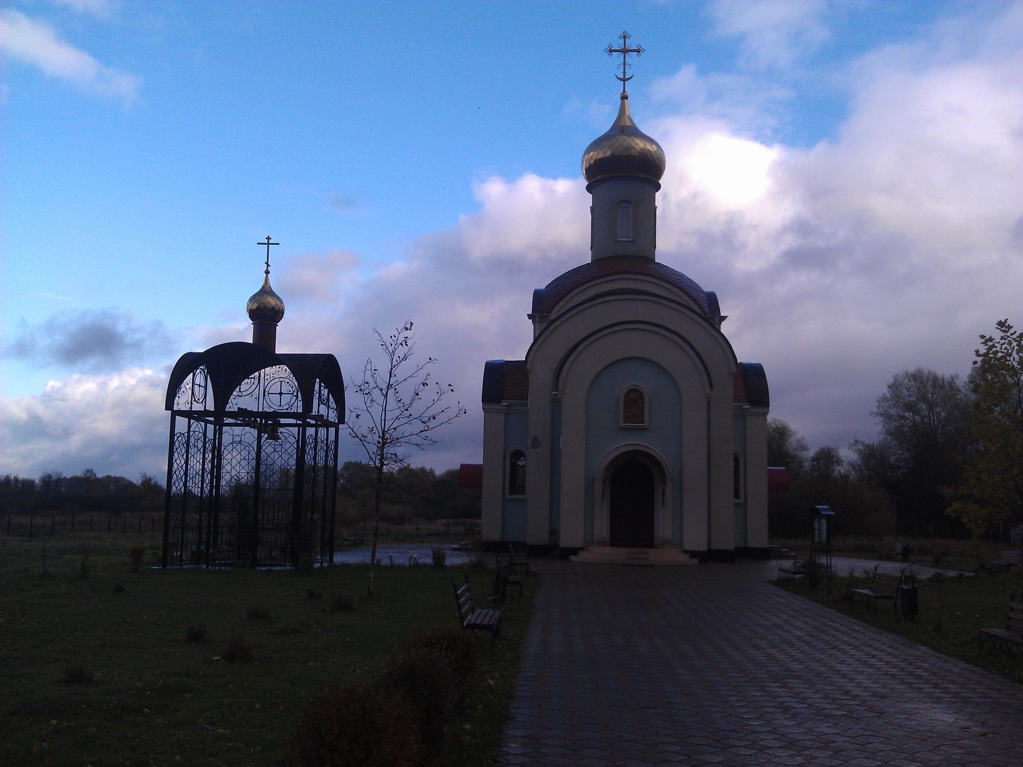 Ксеньевская церковь со звонницей вид с запада